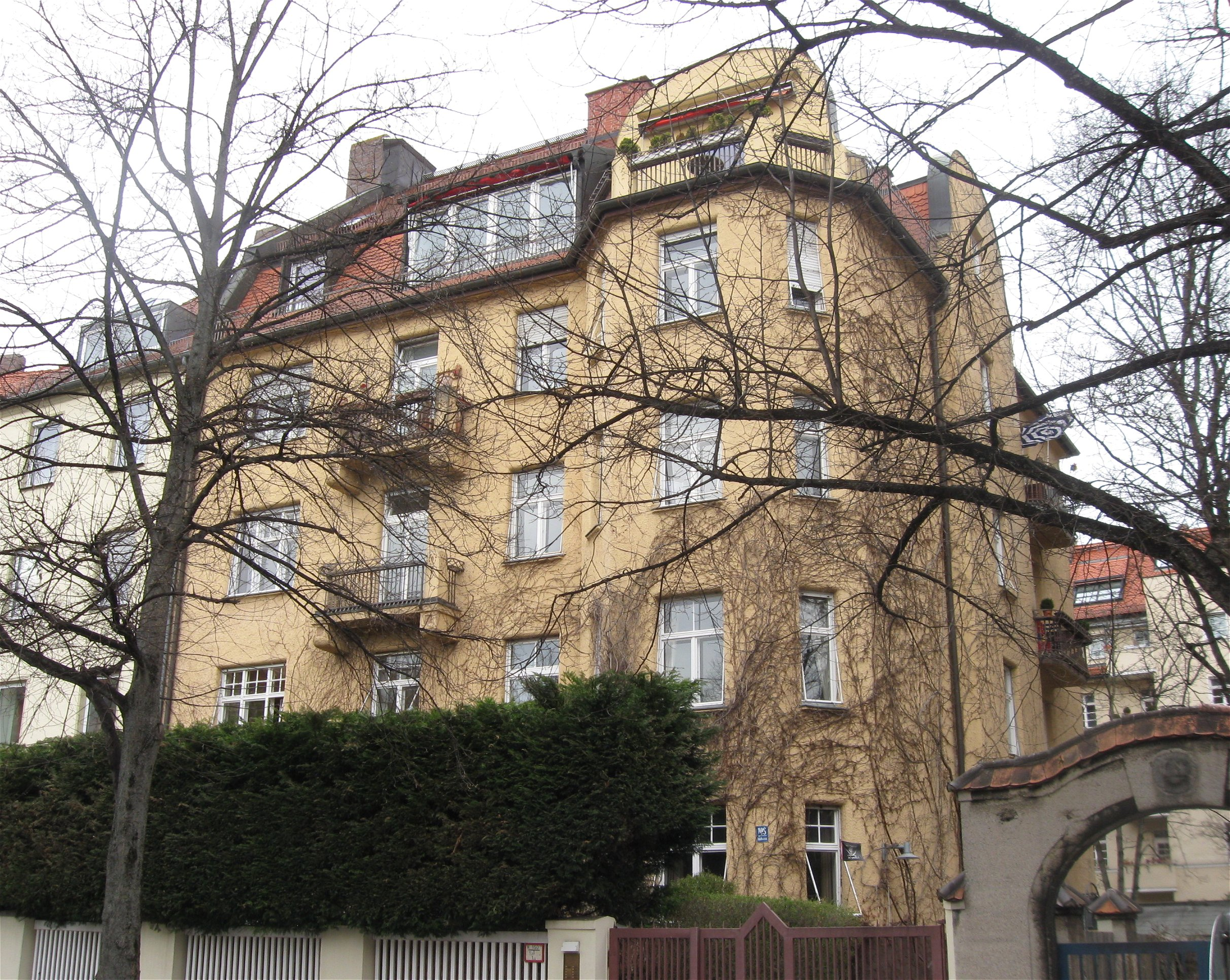 Adalbertstraße 108; Mietshaus, Jugendstil, mit Balkongitter, 1904 von Carl Jäger.